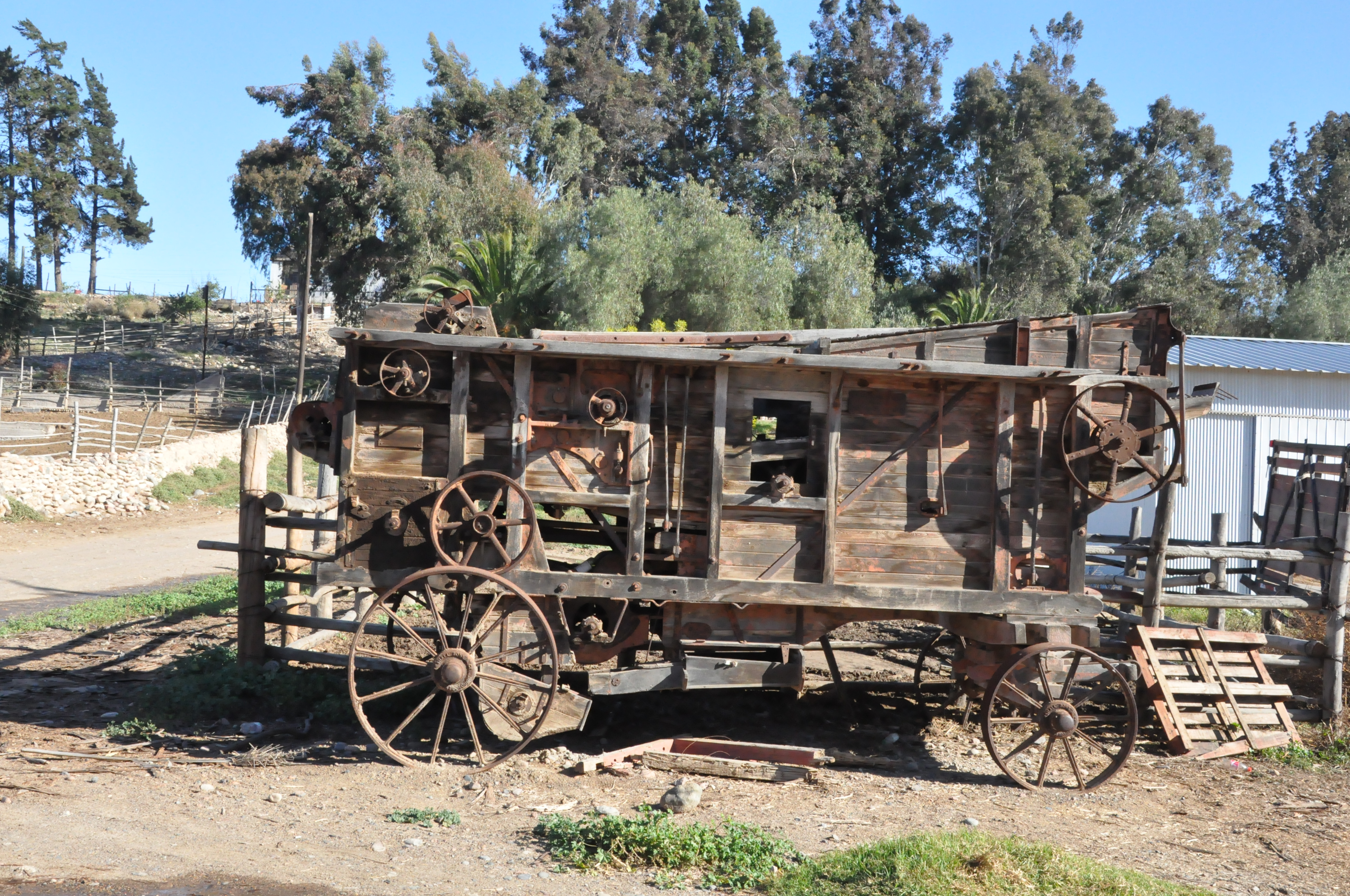 Maquina antigua en localidad de Quebrada Honda Valle del Huasco Chile